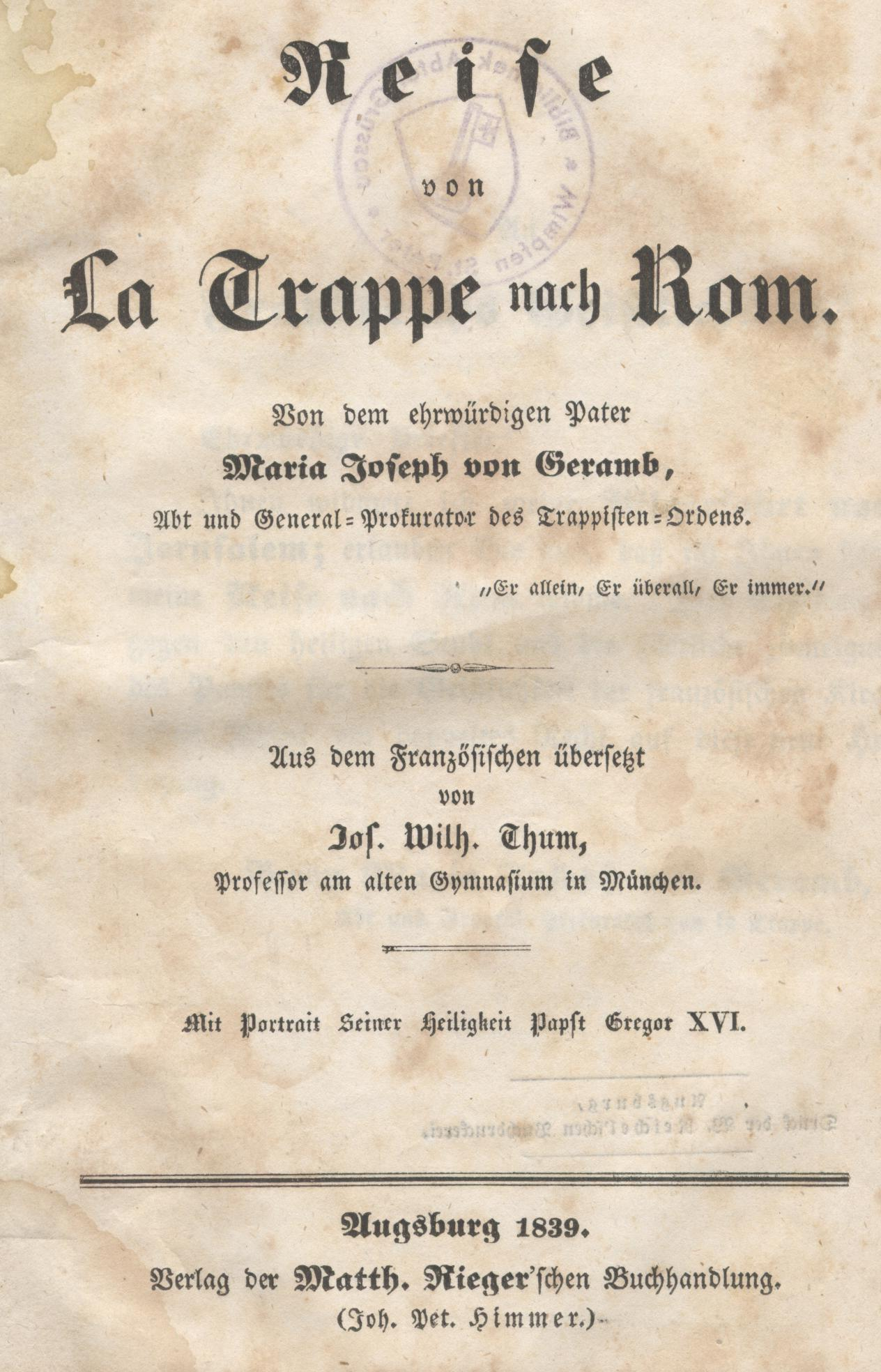 Ferdinand von Geramb (Bruder Maria Joseph Geramb), Buchtitel, 1839